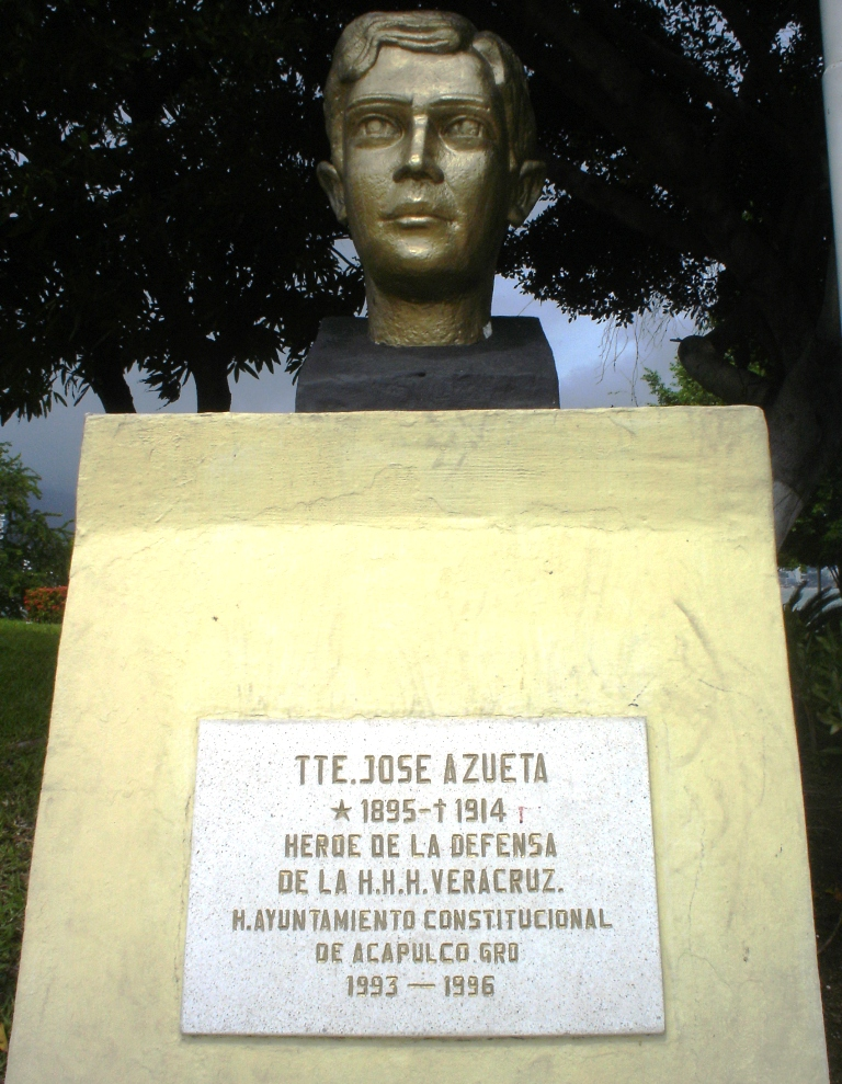 Busto de José Azueta Abad en la Plaza de la H. Escuela Naval Militar del Malecón de Acapulco, Guerrero, México.